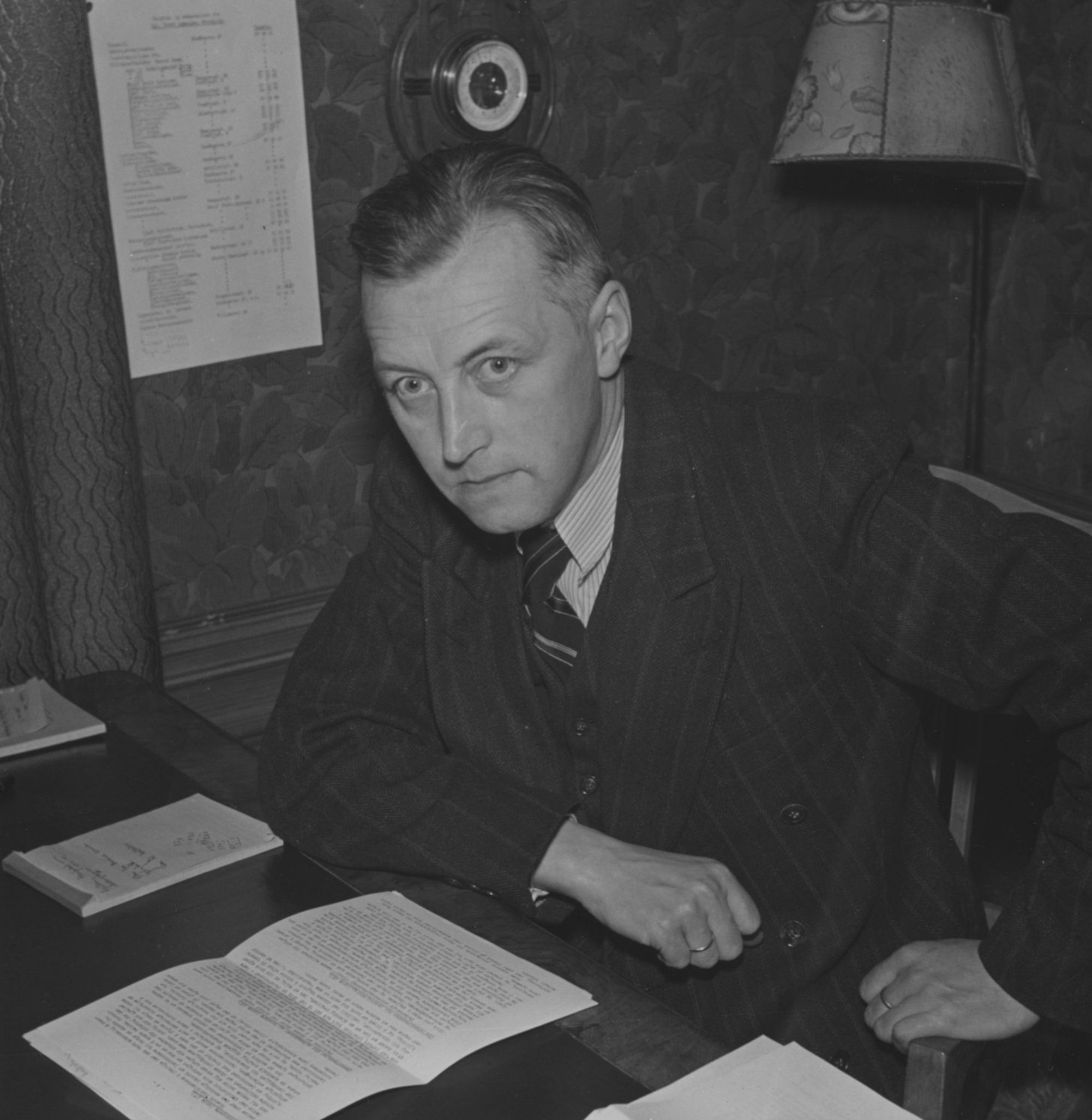 Jon Leirfall ved den norske legasjonen i Stockholm under den andre verdenskrig.